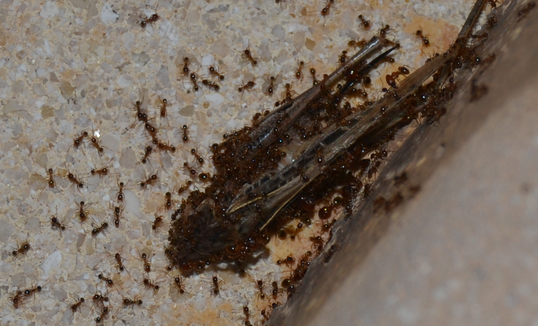 Pheidole pallidula